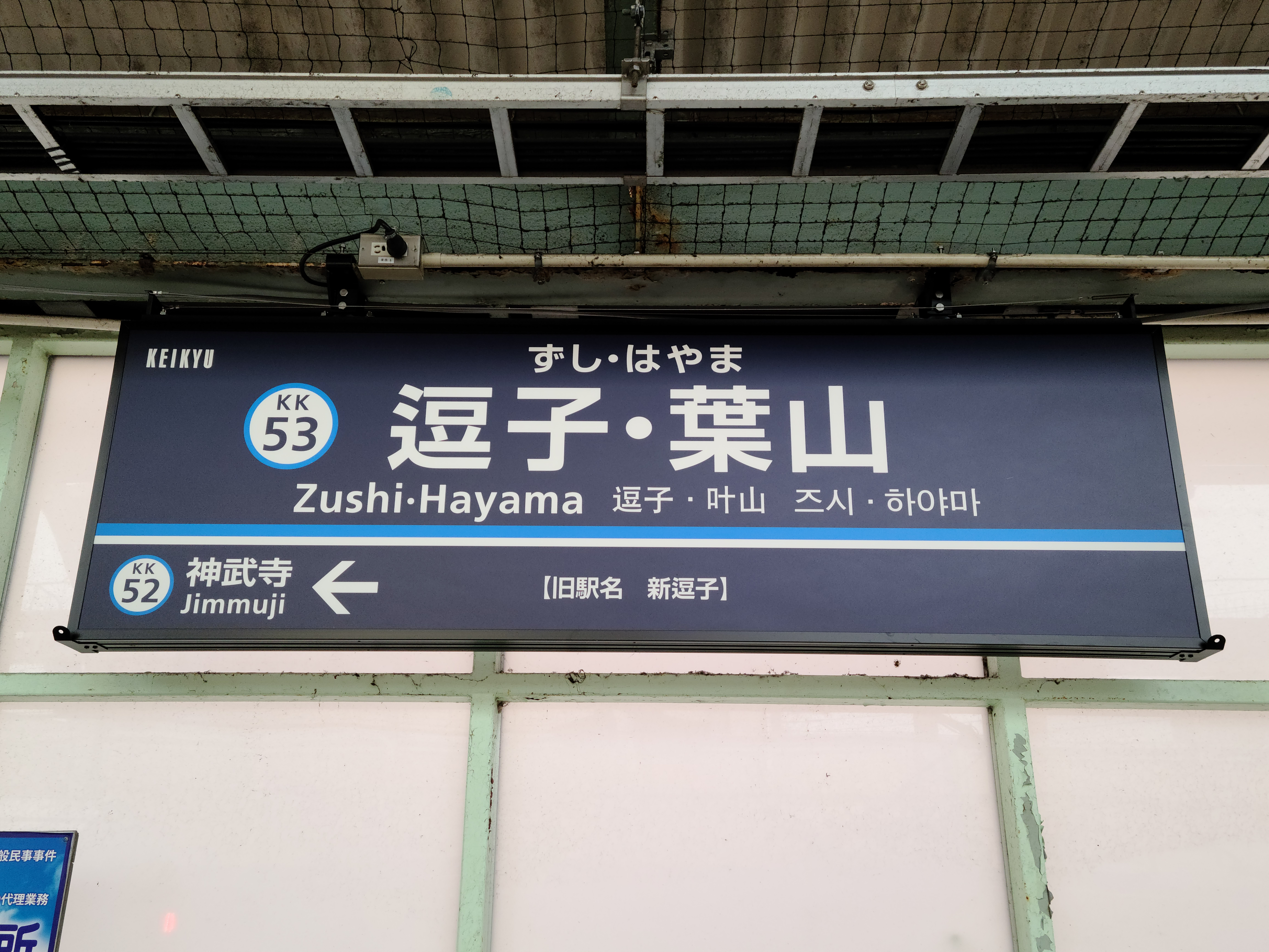 逗子・葉山駅の駅名標